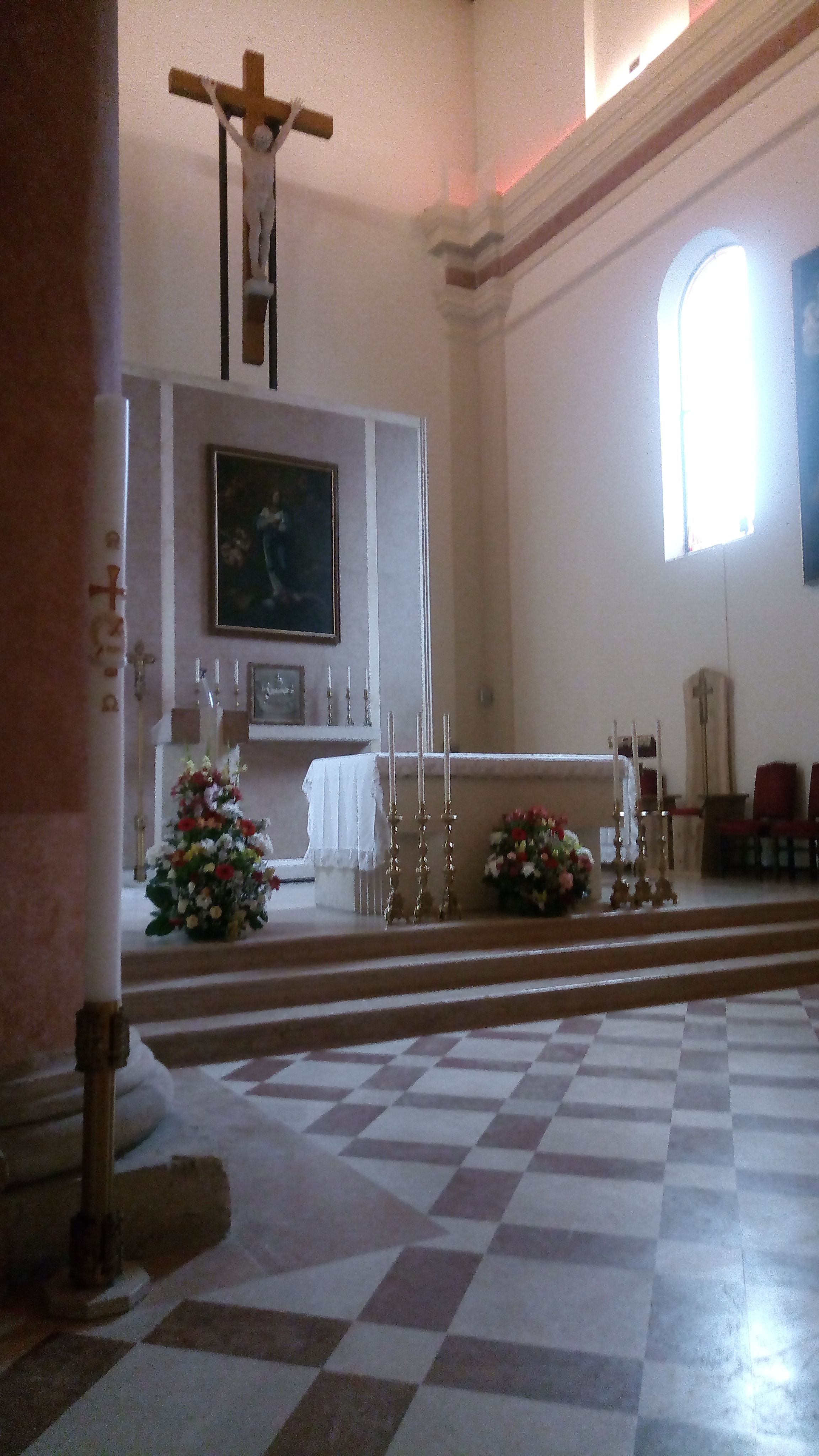 presbiterio